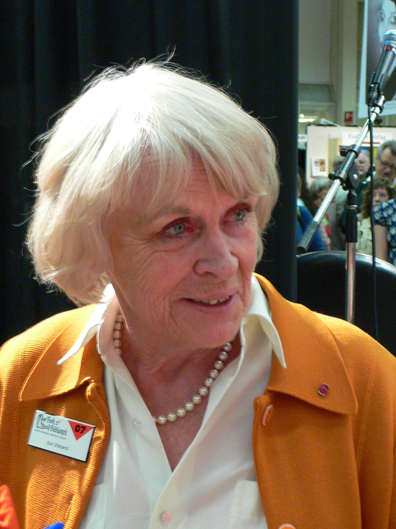 Ilon Wikland at Gothenburg Book Fair 2007, Ilon Wikland på Bok- och biblioteksmässan 2007